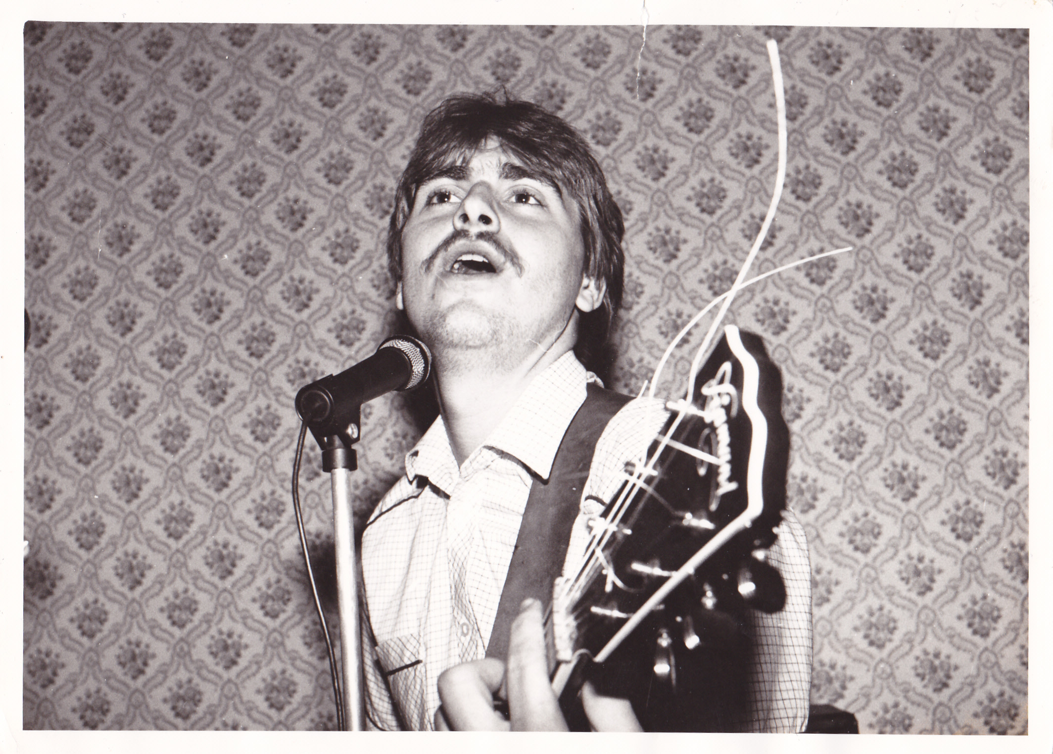 Peter Marcin v rockovej kapele v jeho školských časoch